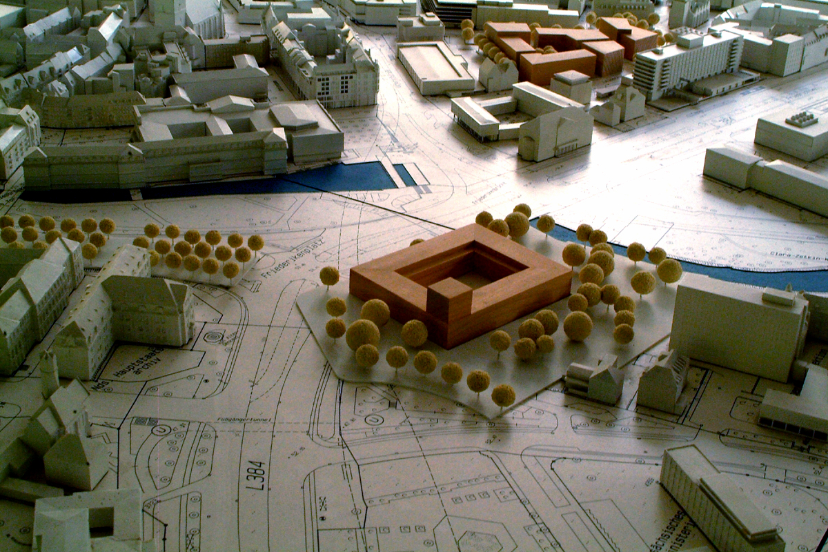 Sie haben ein besseres Bild? Sogar ein historisches Dokument als Bild(ungsförderung)? Zeigen Sie' s uns. Stiften Sie es Ihren Kindern, unseren Enkeln, allen Menschen. Hier.